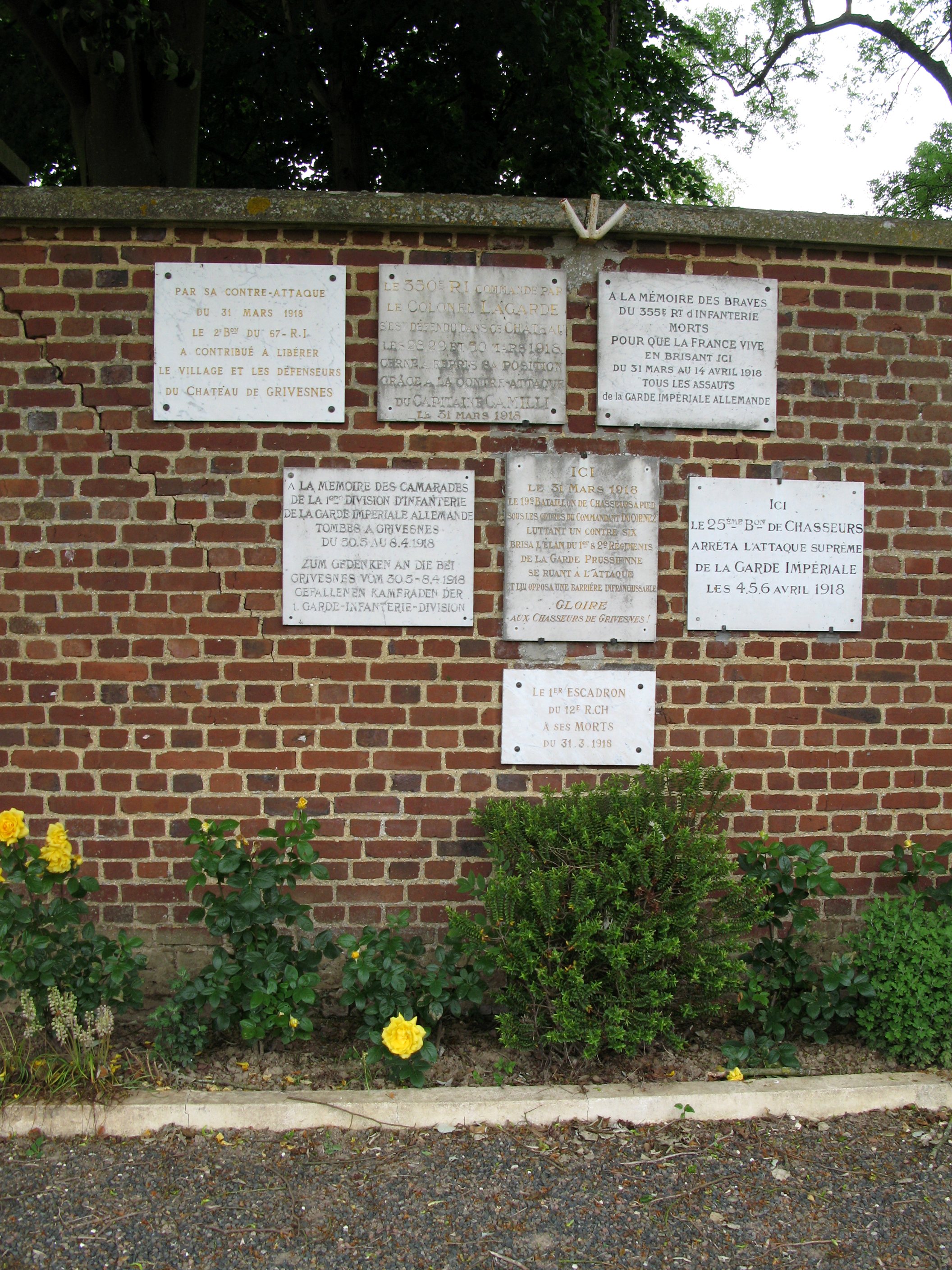 Grivesnes (Somme, France) - Plaques commémoratives rappelant les combats de 1918, fixées sur le mur du château, pratiquement en face de la mairie. .